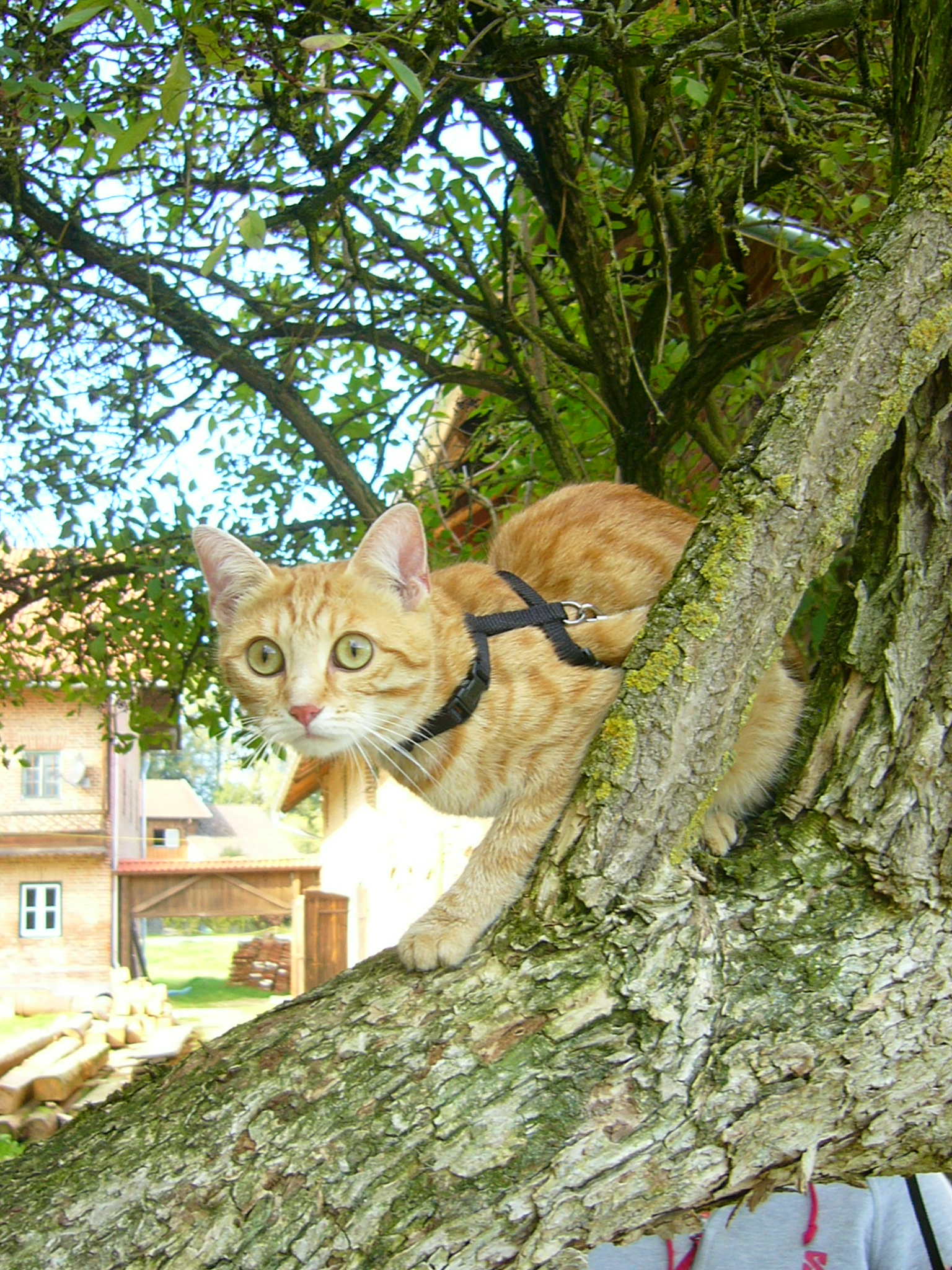 Katze mit aufgerissenen Augen (Wohnungskatze in fremder Umgebung)